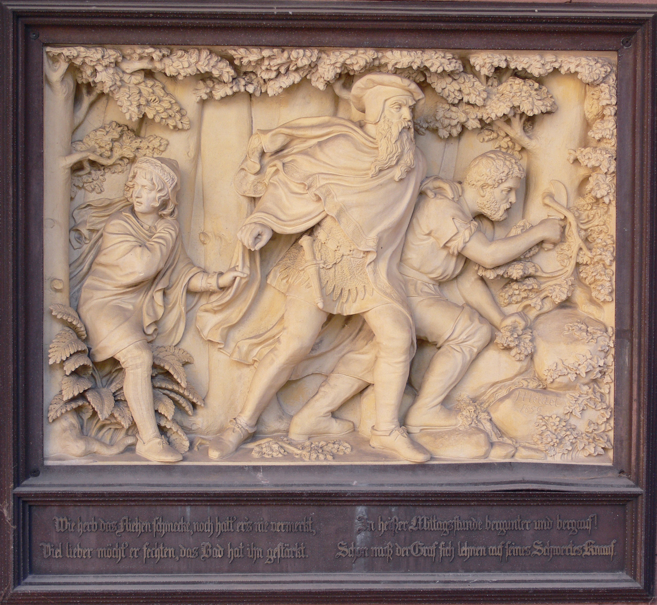 Relief mit Darstellung der Gründungssage des Ortes (Graf Eberhard II. der Greiner im Wildbad), Bad Wildbad